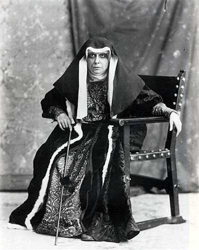 La actriz española Margarita Xirgu (1888-1969), interpretando la obra Santa Juana de Castilla, de Benito Pérez Galdós